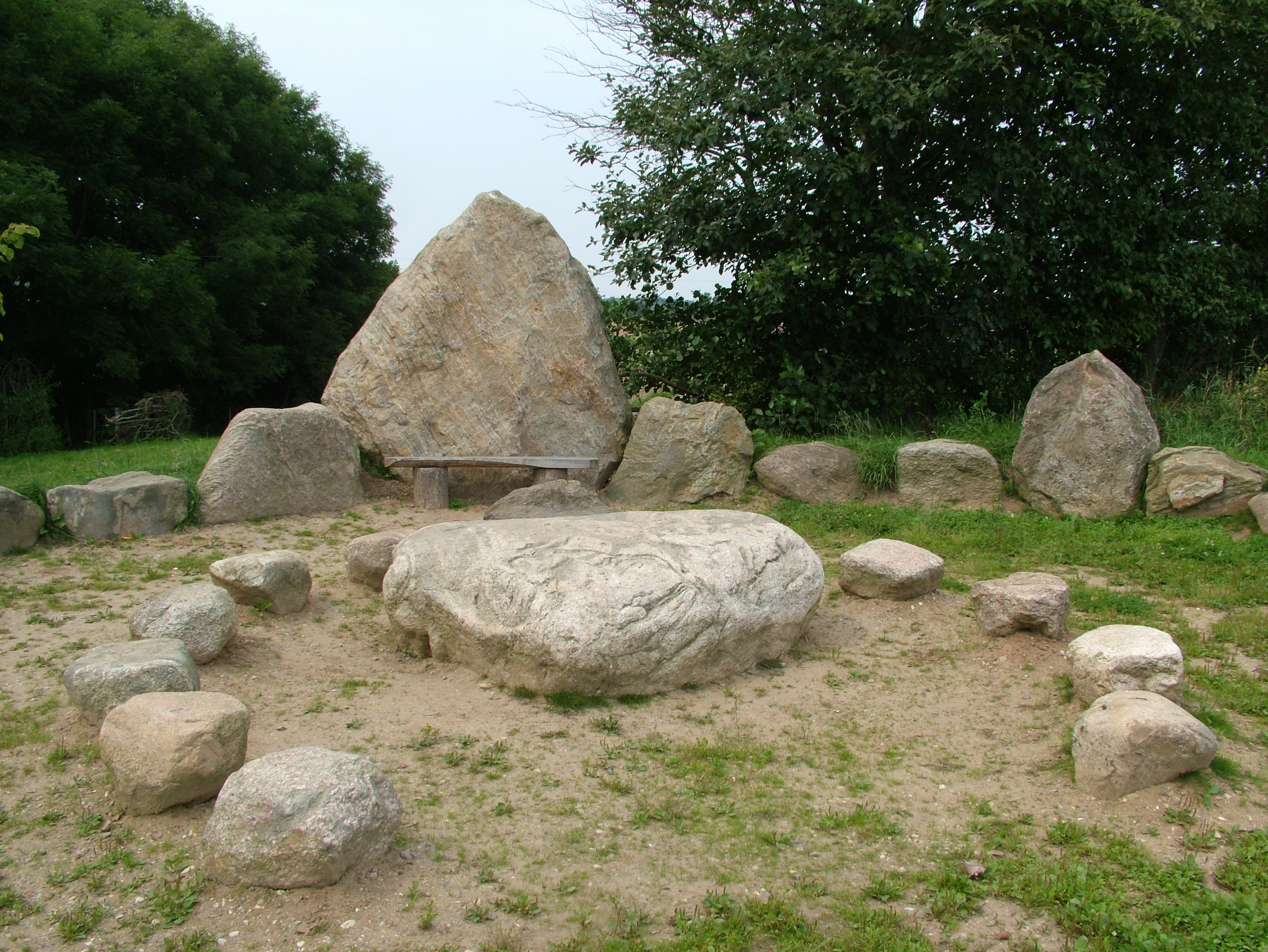 Stoltebüll, Schleswig-Holstein, ein alter Gerichtsplatz, ein Thingplatz.